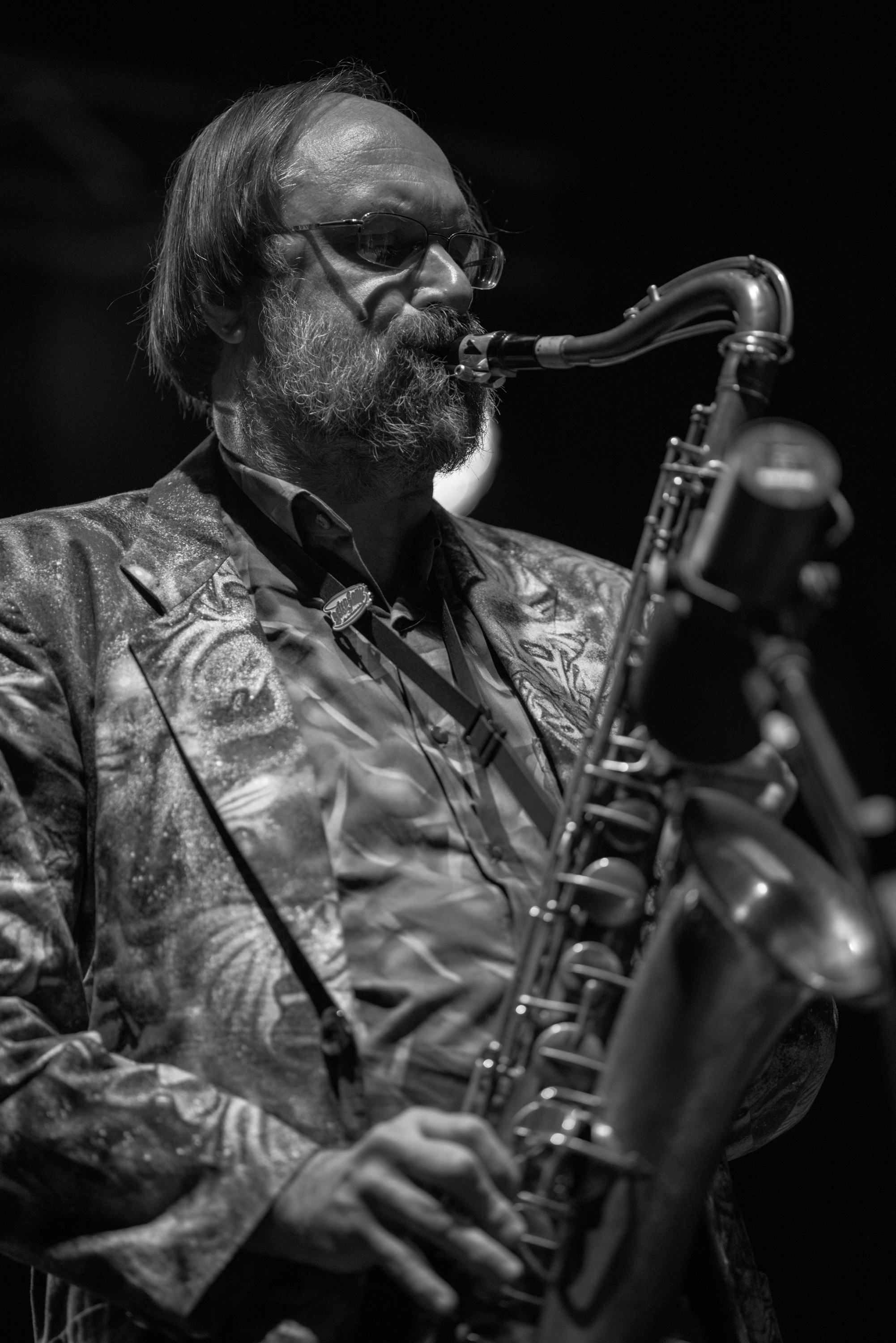 Scott Robinson 19º FESTIVAL INTERNACIONAL DE JAZZ DE PUNTA DEL ESTE FINCA EL SOSIEGO, Maldonado, Uruguay